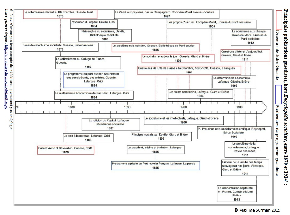 Frise chronologique